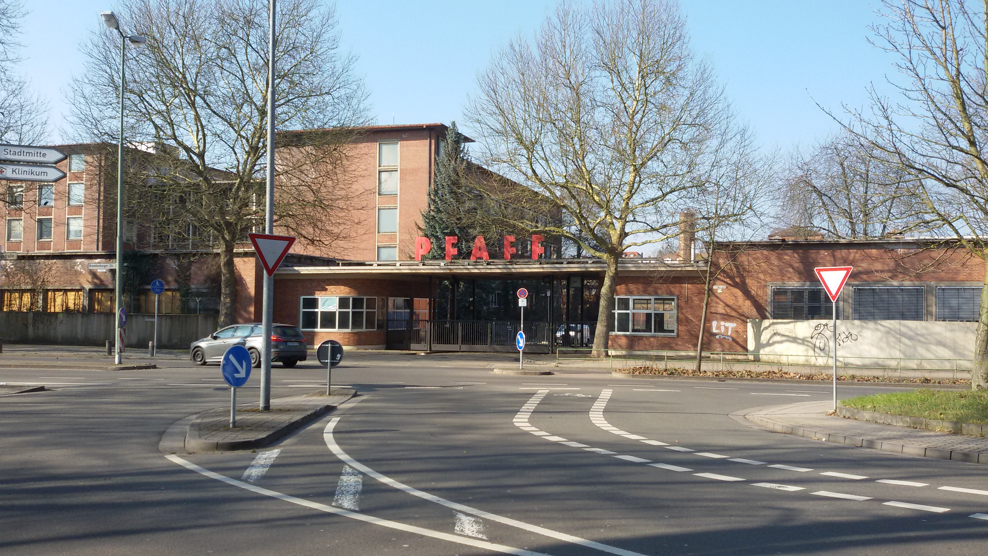 Blick auf das in der Sanierung befindliche Pfaffwerk im Februar 2018